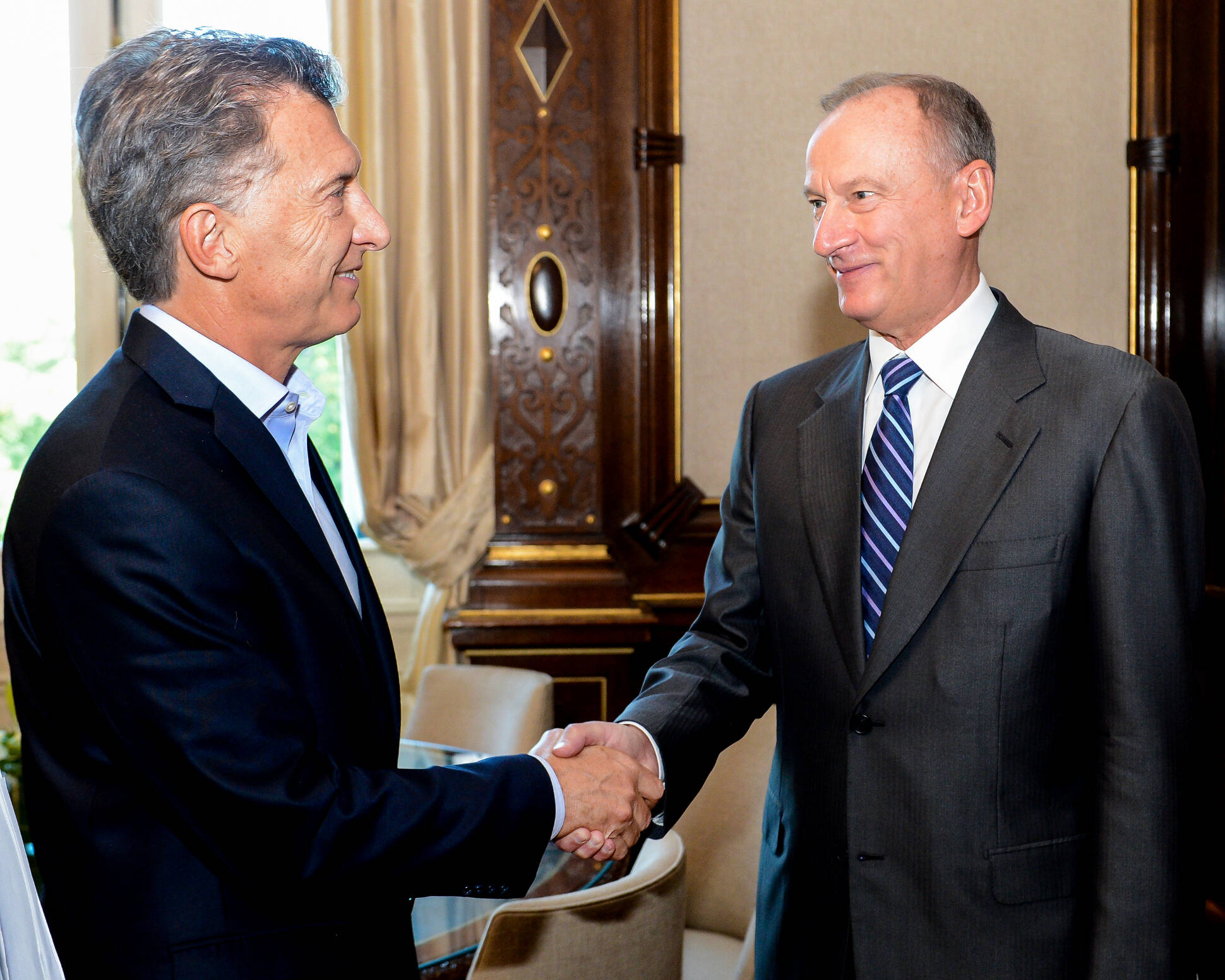 El presidente Mauricio Macri recibió al secretario del Consejo de Seguridad de Rusia, Nikolai Patrushev, quien viajó al país en visita oficial durante la cual mantuvo reuniones de trabajo con ministros y secretarios. El funcionario ruso también se reunió con el jefe de Gabinete de la Nación, Marcos Peña, y con el secretario de Asuntos Estratégicos, Fulvio Pompeo. Durante la visita se suscribió un memorándum de entendimiento que provee el marco para que ambos países establezcan consultas regulares e intercambien visiones sobre cuestiones estratégicas de interés común, así como también fortalezcan la colaboración para promover la paz y la estabilidad global. Además de Peña y Pompeo participaron de las reuniones con Patrushev los ministros de Seguridad, Patricia Bullrich; de Defensa, Oscar Aguad; el canciller Jorge Faurie; los secretarios de Seguridad, Eugenio Burzaco; de Justicia, Santiago Otamendi, y de Relaciones Exteriores, Daniel Raimondi, y el Jefe del Estado Mayor del Ejército, Diego Suñer. Por Rusia lo hicieron el embajador en la Argentina, Victor Koronelli, el subsecretario del Consejo de Seguridad, Oleg Jramov; el primer viceministro de Justicia, Oleg Plojoy; el secretario de Estado y viceministro del Interior, Igor Zubov, y el comandante en Jefe del Ejército, Oleg Salyukov, entre otros funcionarios. En la reunión realizada en el despacho presidencial, Patrushev le obsequió a Macri la camiseta titular que el seleccionado de fútbol de ese país utilizará en la Copa del Mundo Rusia 2018.